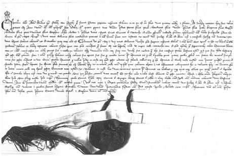 Kolomanova povelja